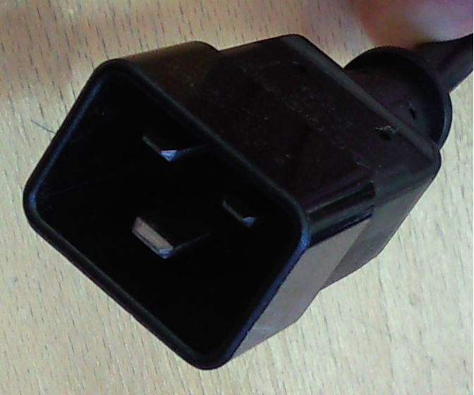 Spina Volante IEC 60320-C20